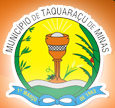 Brasão de Armas do município de Taquaraçu de Minas, Minas Gerais, Brasil.